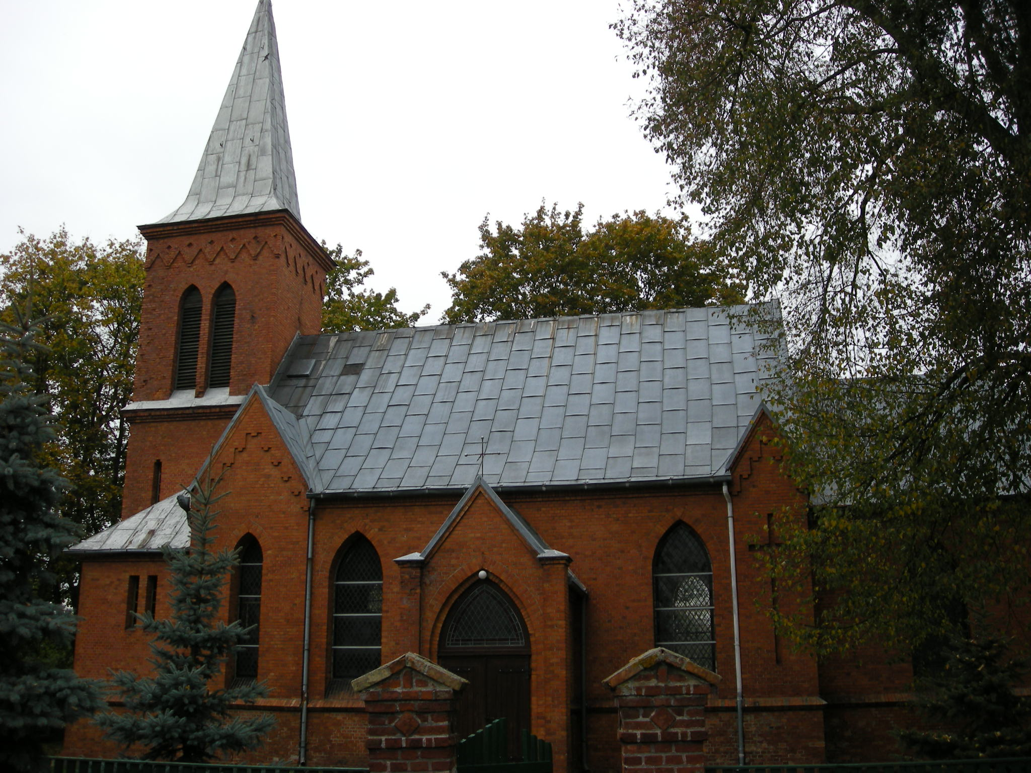 Samoklęski Duże - kościół parafialny pw. św. Bartłomieja Apostoła z lat 1891-92 (zabytek nr A/1584)